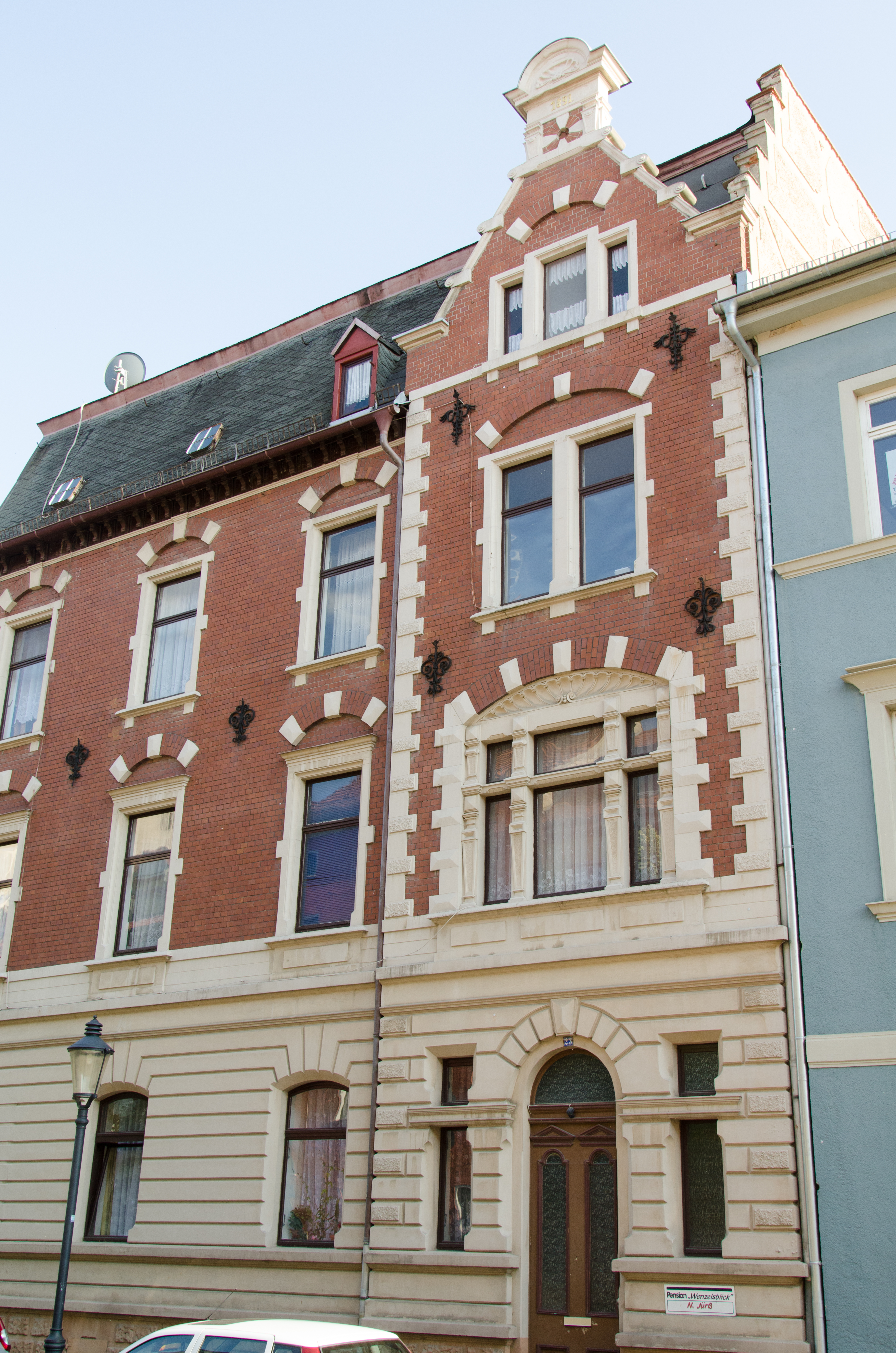 Naumburg, Fischstraße 23